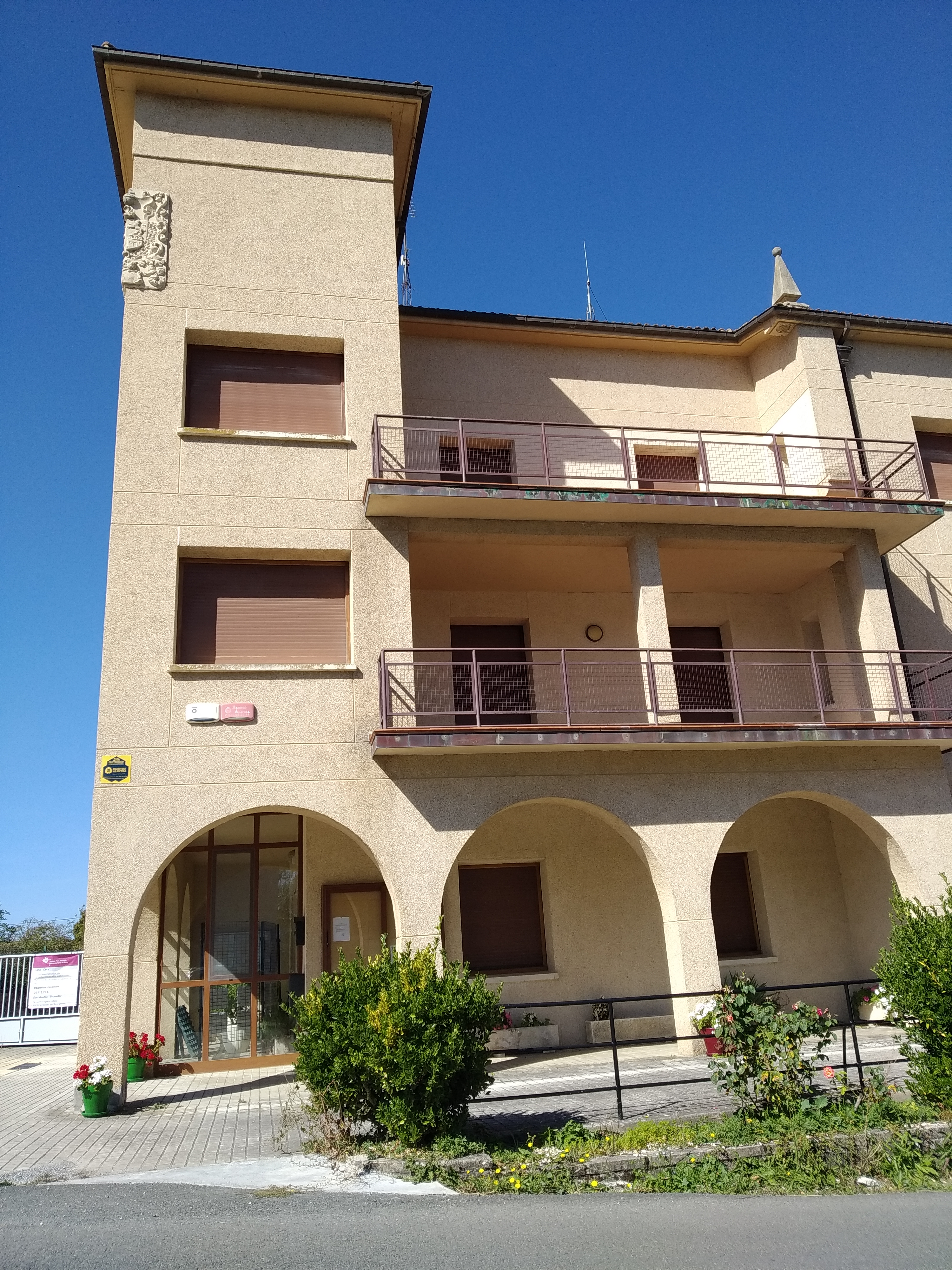 udaletxea Erdoña herrian